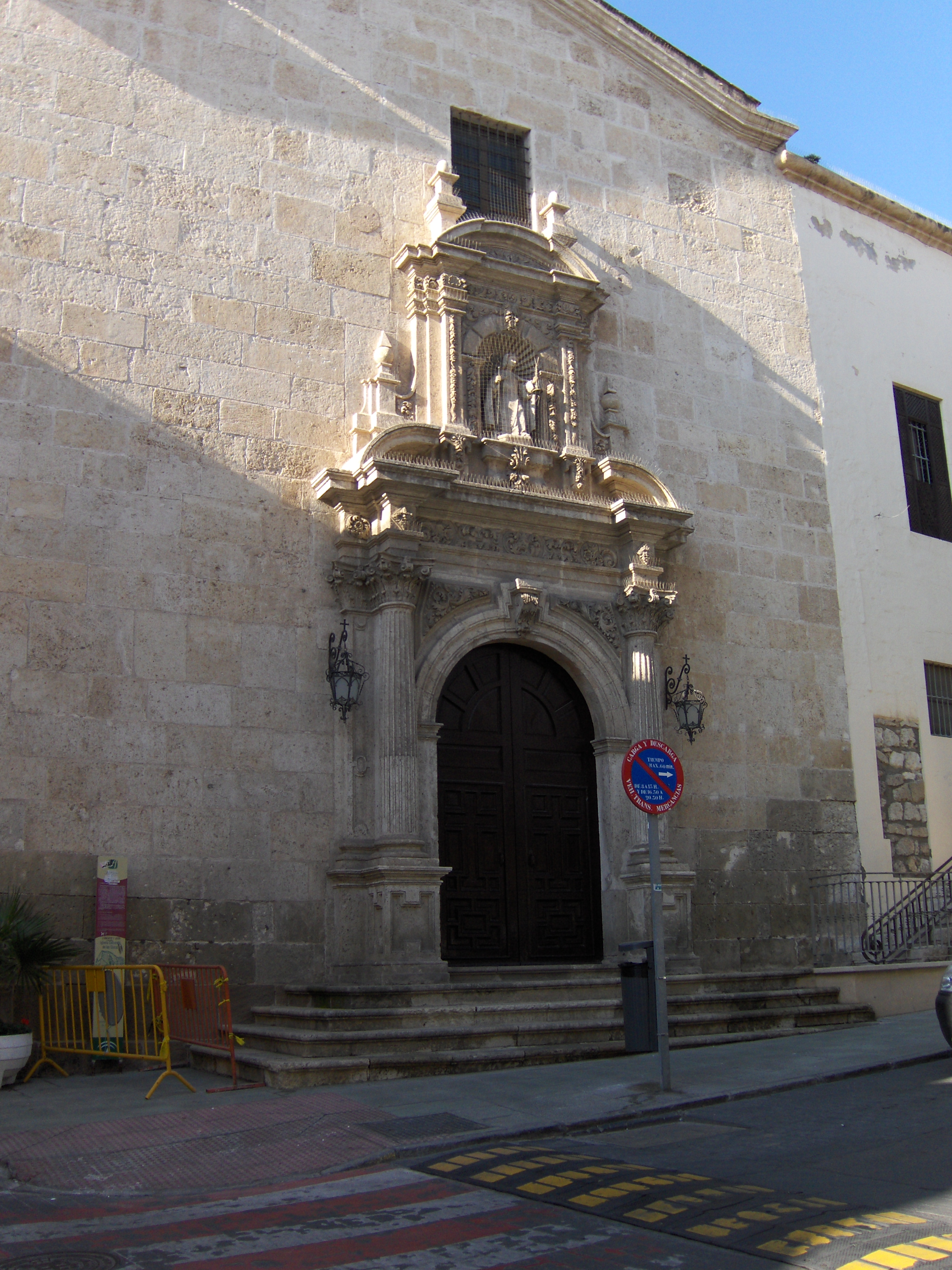 Convento de las Claras, en Almería